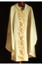 ornamento sacerdotal casulla blanca